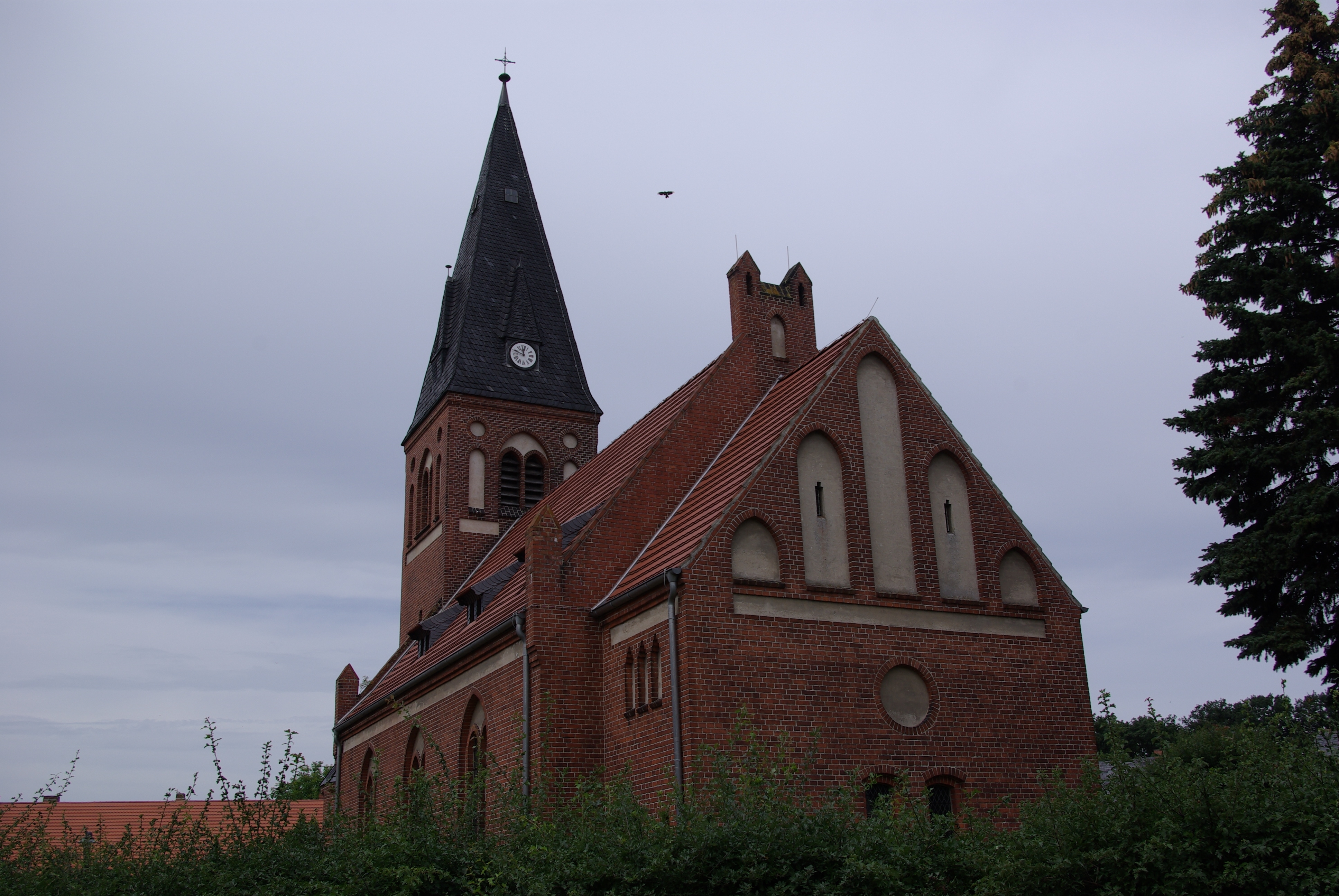 Bad Wilsnack in Brandenburg, Ortsteil Klein Lüben. Die Kirche in Klein Lüben steht unter Denkmalschutz. Die Kirche wurde 1904 erbaut.